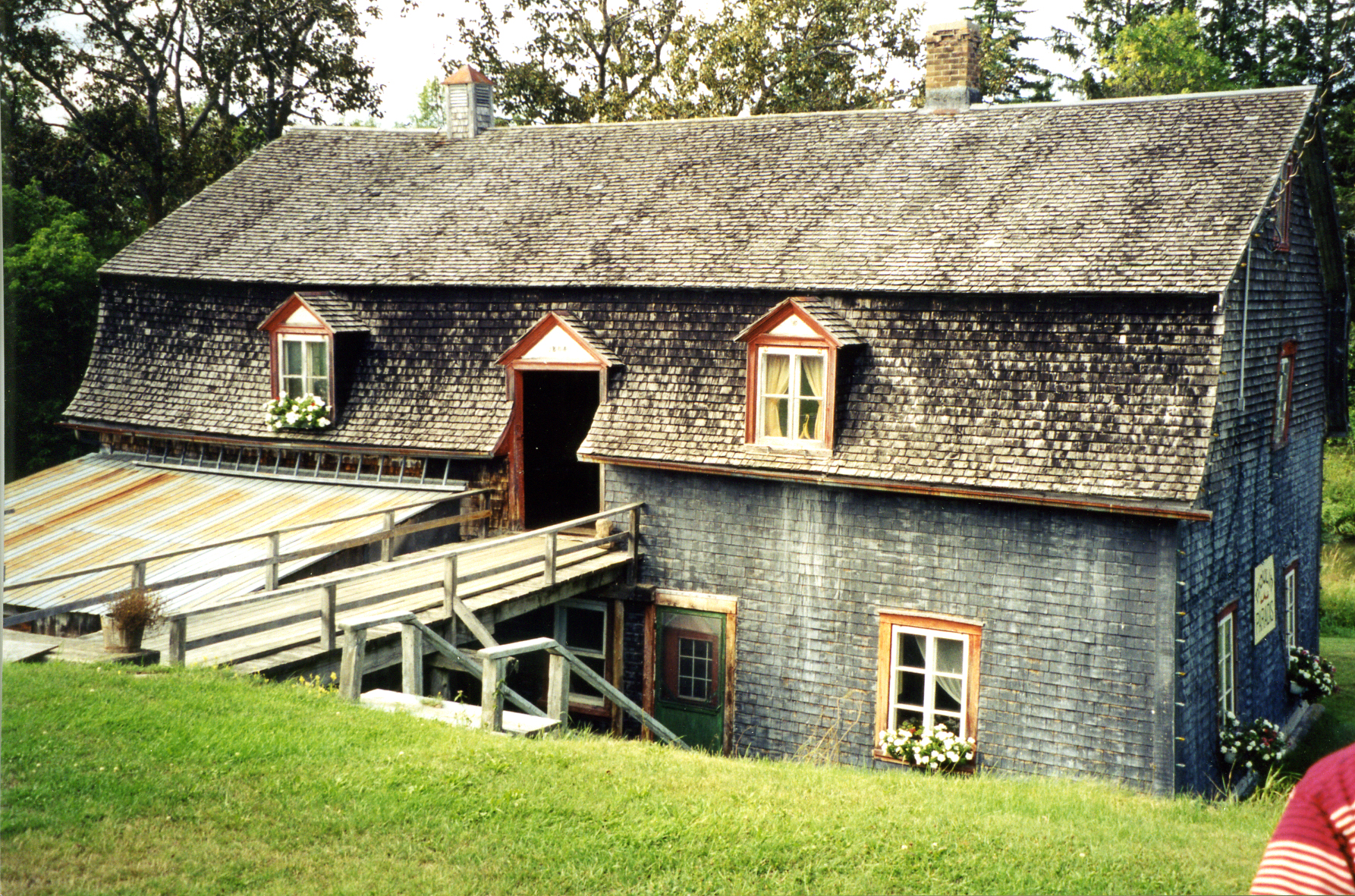 Moulin Paradis, situé à Kamouraska (Chaudière-Appalaches, Québec). Moulin à eau; moulin à farine.